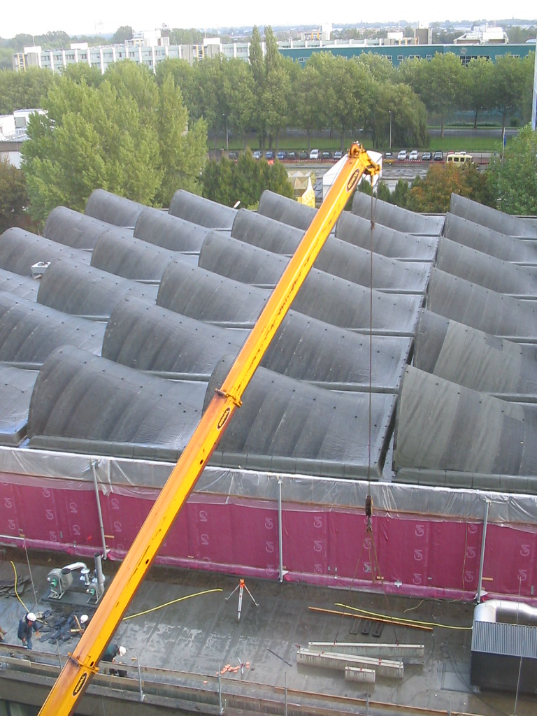 bouwwerkzaamheden naast gebouw Civiele Techniek, Delft